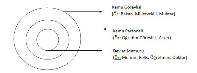 Kamu Personeli, Kamu Görevlisi, Devlet Memuru